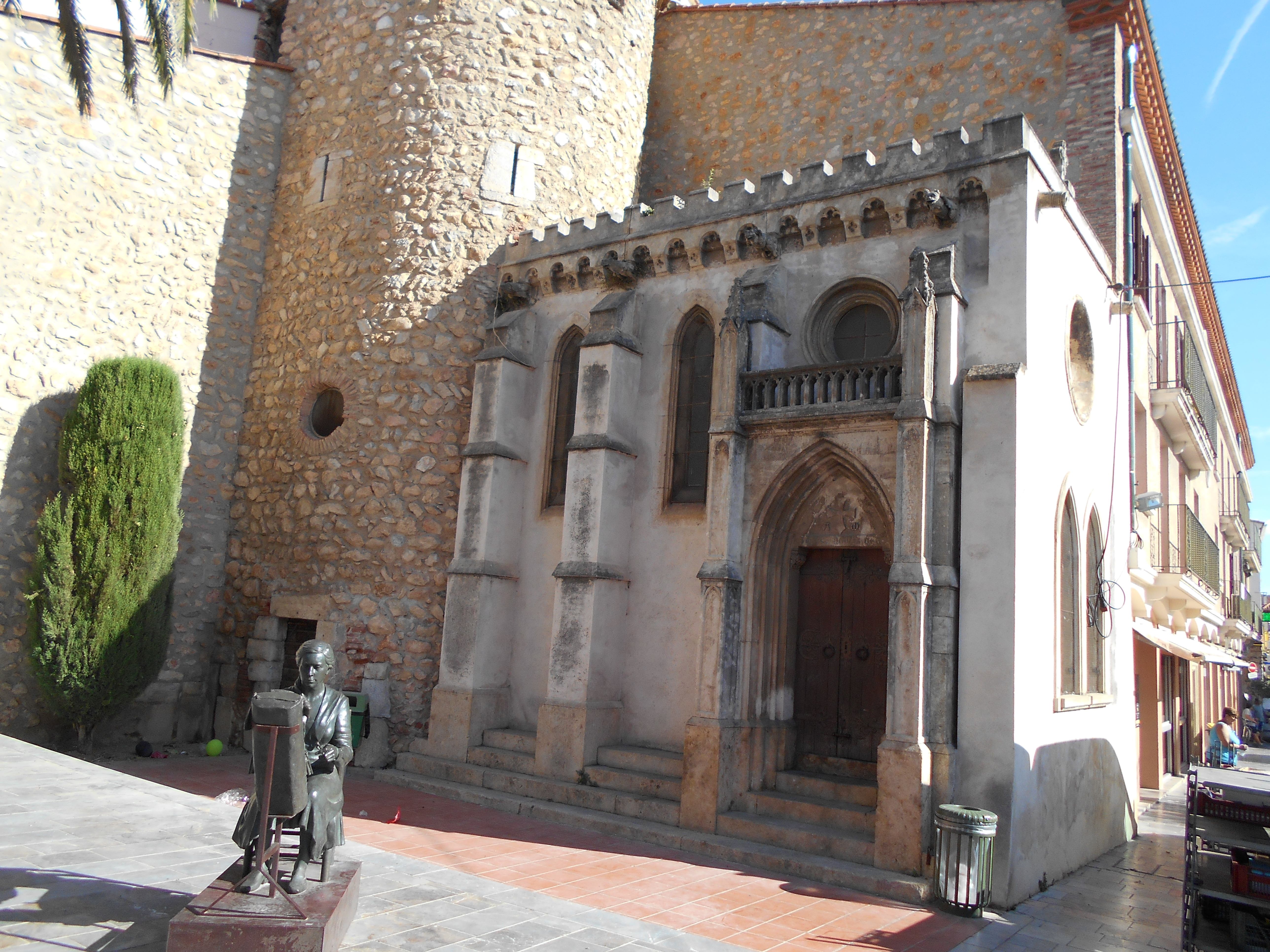 Sant Joan de Tuïr